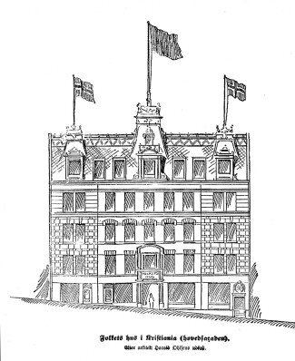 Folkets Hus i Oslo ved innvielsen i 1907. Tegning etter arkitekt Harald Ohlsens utkast